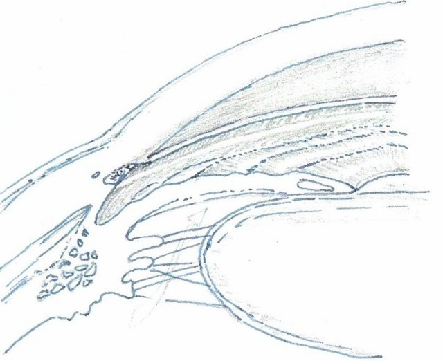 本人从眼科手术学上临摹，如果临摹属于侵权请删除